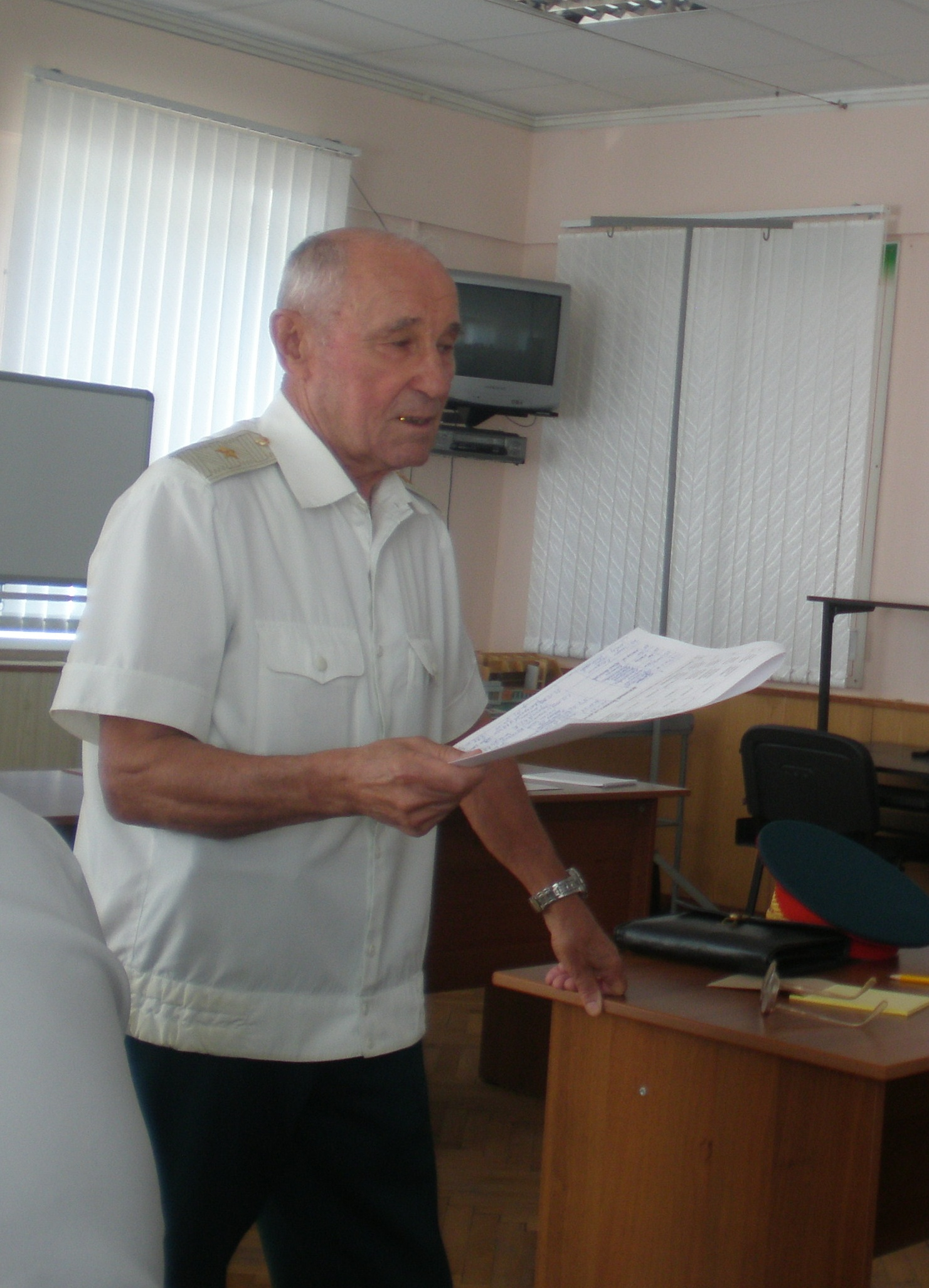 Яцук, Сергей Григорьевич - руководитель краснодарской группы инспекторов ОСК ЮВО. Краснодар 2012.